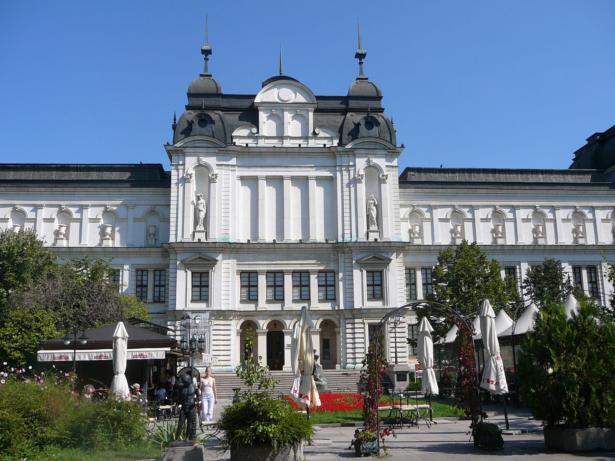 Национална галерия за чуждестранно изкуство